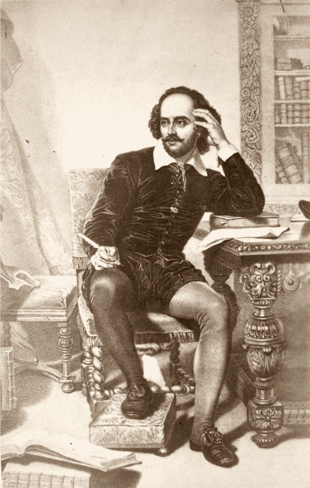 William Shakespeare 1564-1616 englischer Dichter. Bedeutendster Dramatiker der Weltliteratur.